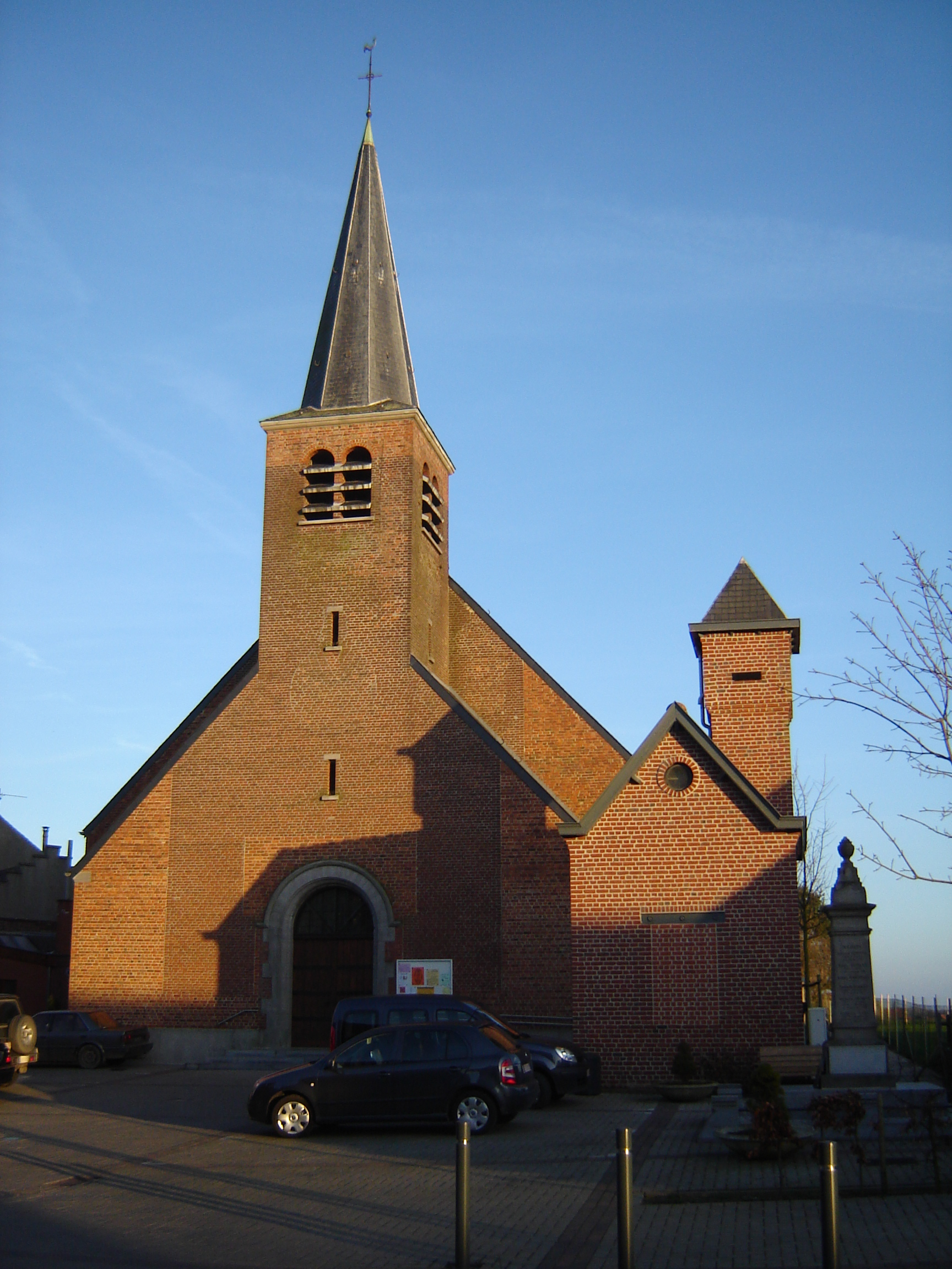 Eglise Saint-Joseph in La Glanerie, Rumes, Hainaut, Belgium